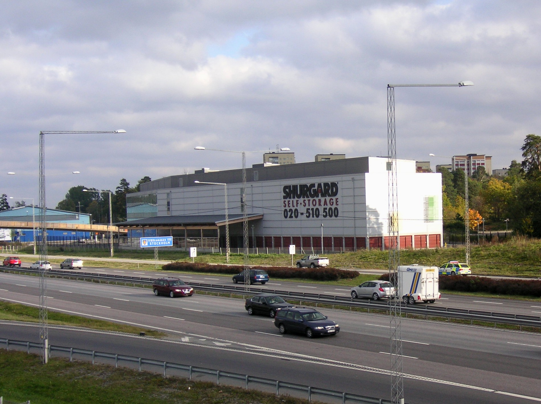 Shurgard Fruängen, där "Gyllene Ratten" en gång fanns